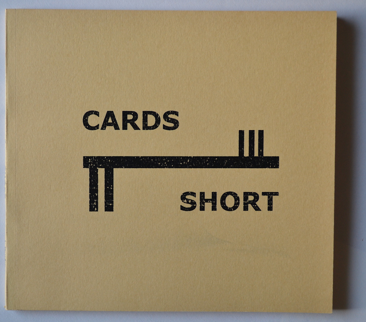 CARDS-SHORT